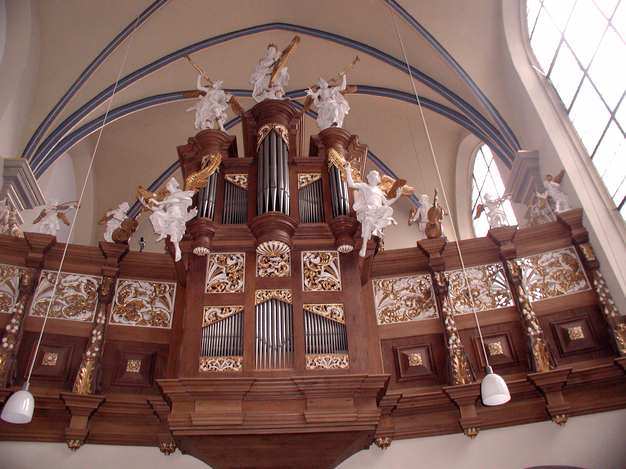 Brühl, Schlosskirche